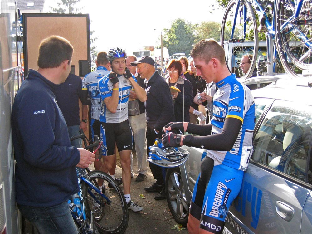 départ de la course Paris Tour à Saint Arnoult